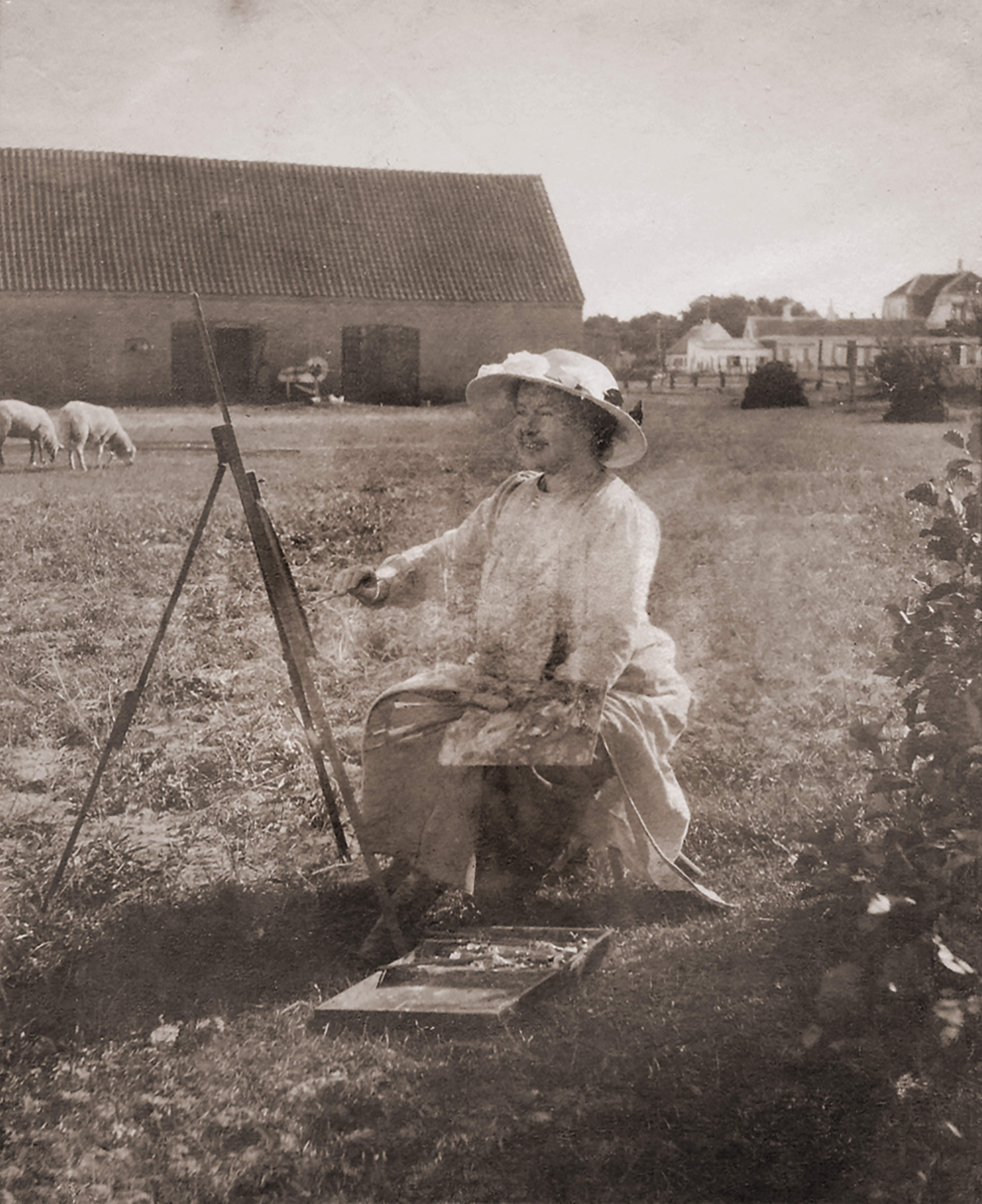 Helga Ancher som friluftsmaler (ca. 1915)